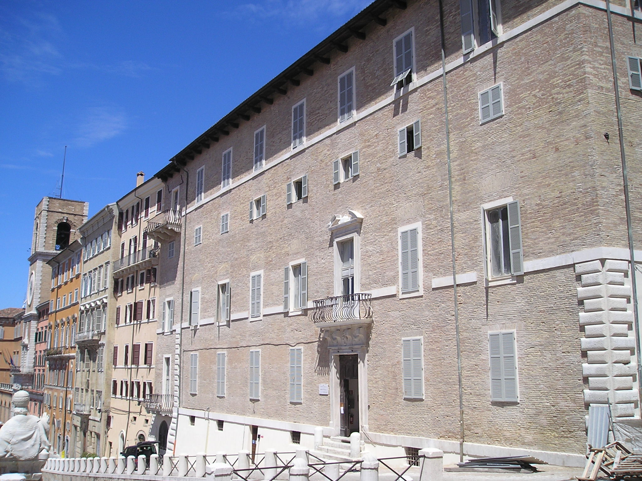 Foto di Ancona scattata nel maggio 2005 da Massimo Macconi